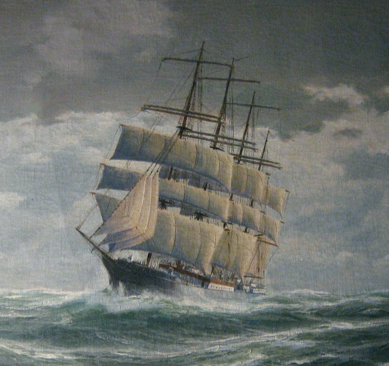 Vier-Mast-Bark Peking detail